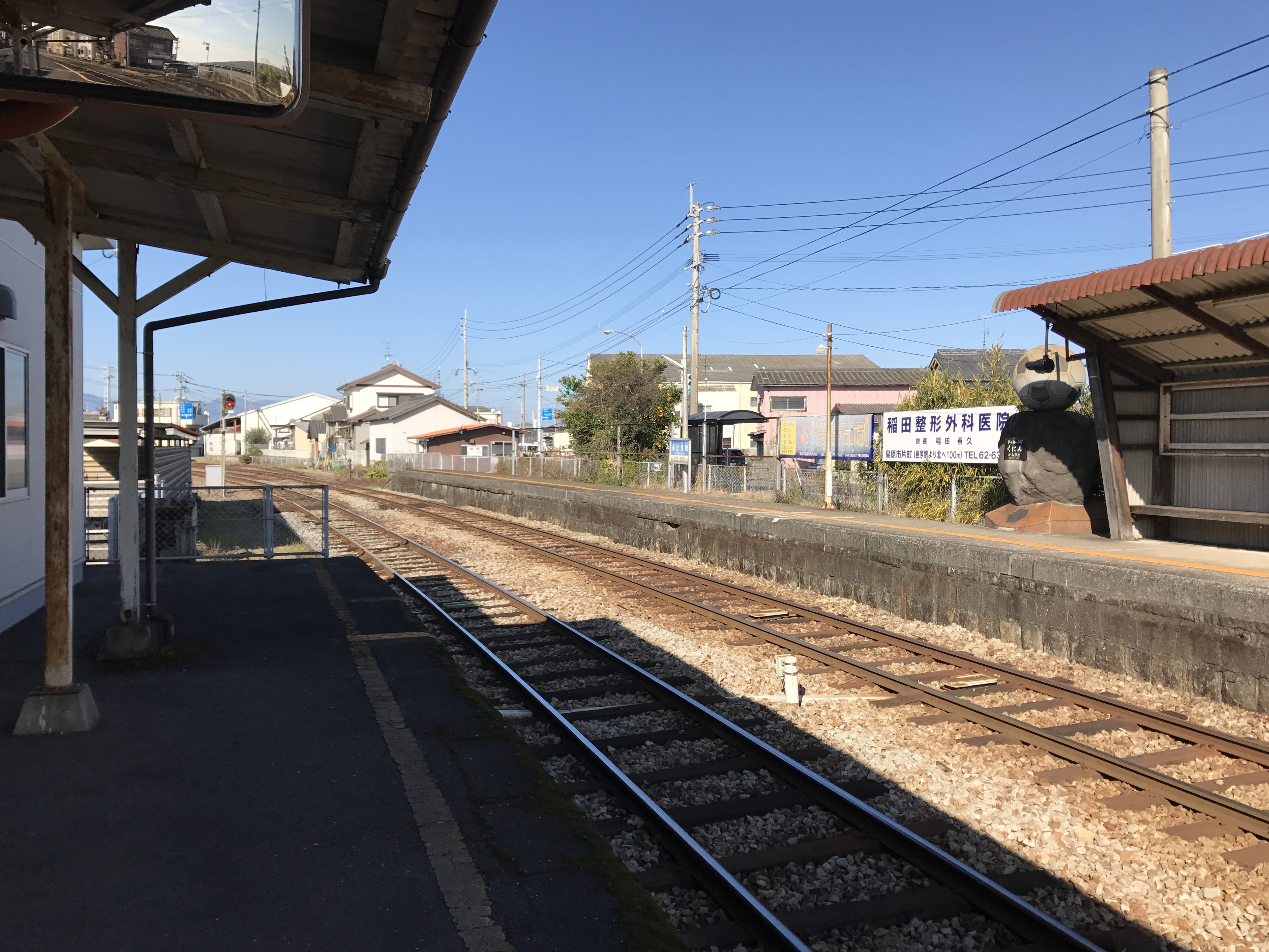 多比良町駅のホーム(奥は神代町方面)